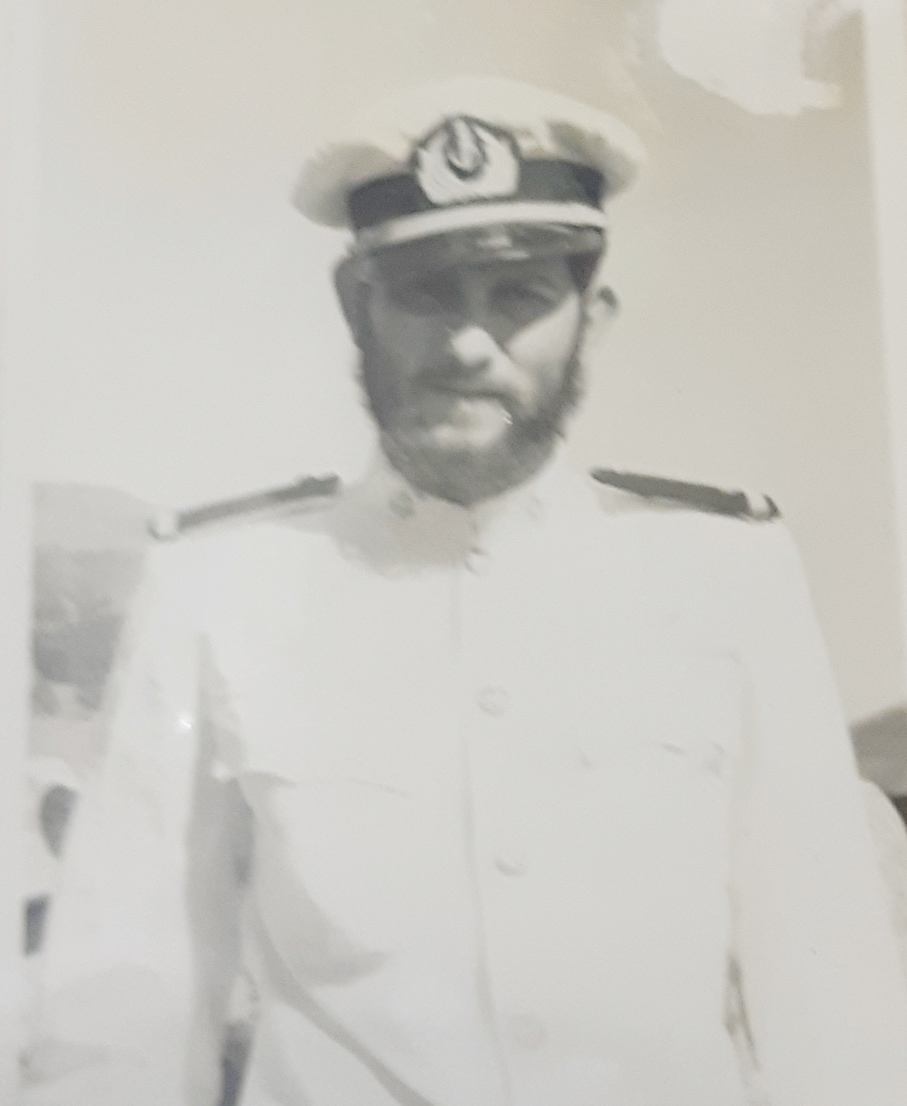 הרב סג"מ מנחם כהן של שהצטרף לפריגטה אח"י משגב במבצע משווה 1955